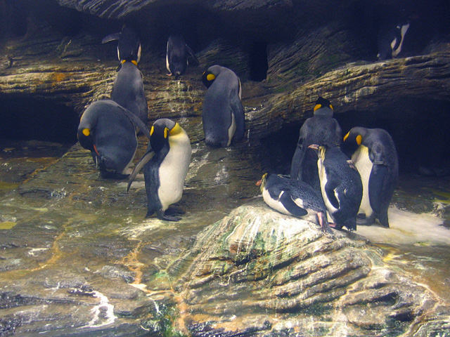 2 soorten pinguïns in Vriesland, het poolstreken-gebouw in de Zoo van Antwerpen